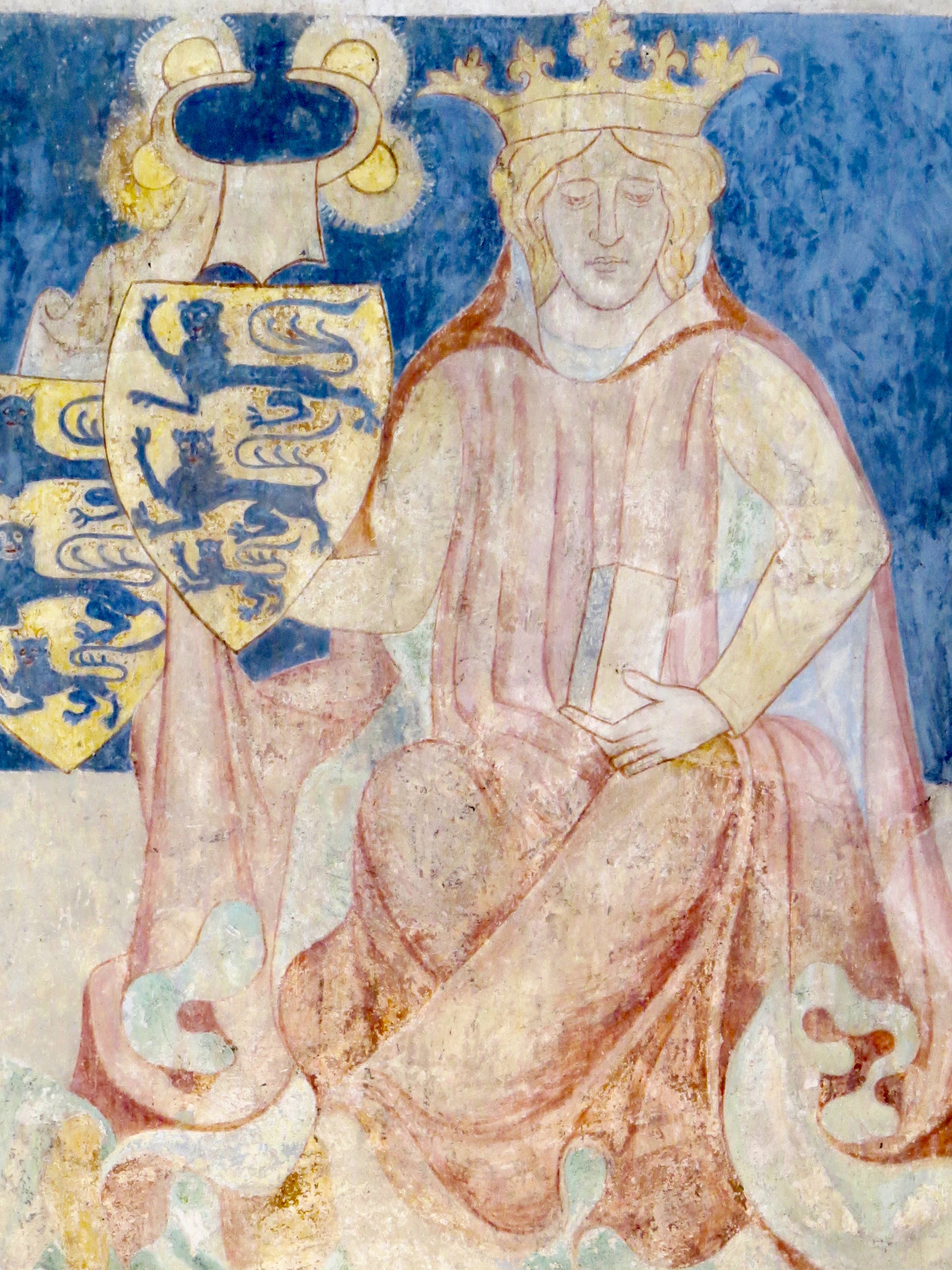 Knud VI, fra Kongefrisen i Sankt Bendts Kirke, Ringsted, Sjælland